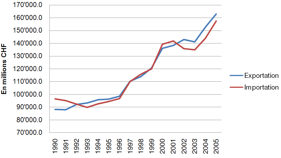 Exportation et Importation suisse 1990-2005